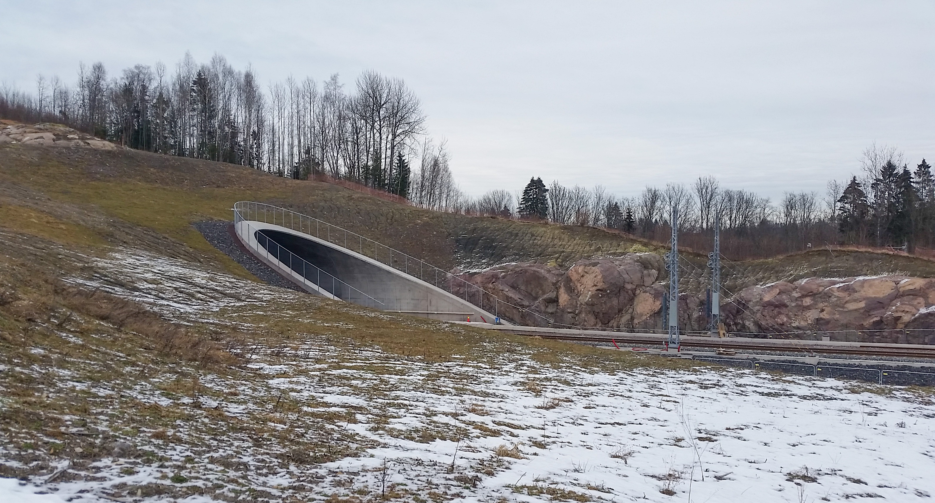 Holmestrandsportens søndre portal